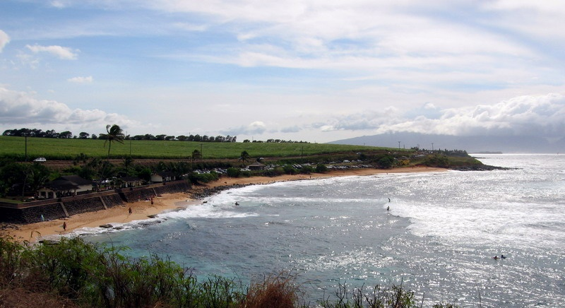 Der Strand von Ho'okipa auf der Insel Maui, Hawaii.